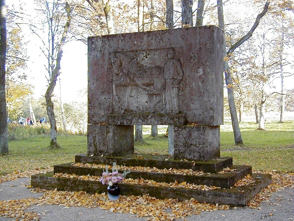 Plācis, piemineklis Ziemeļlatvijas atbrīvotājiem 2000-10-01